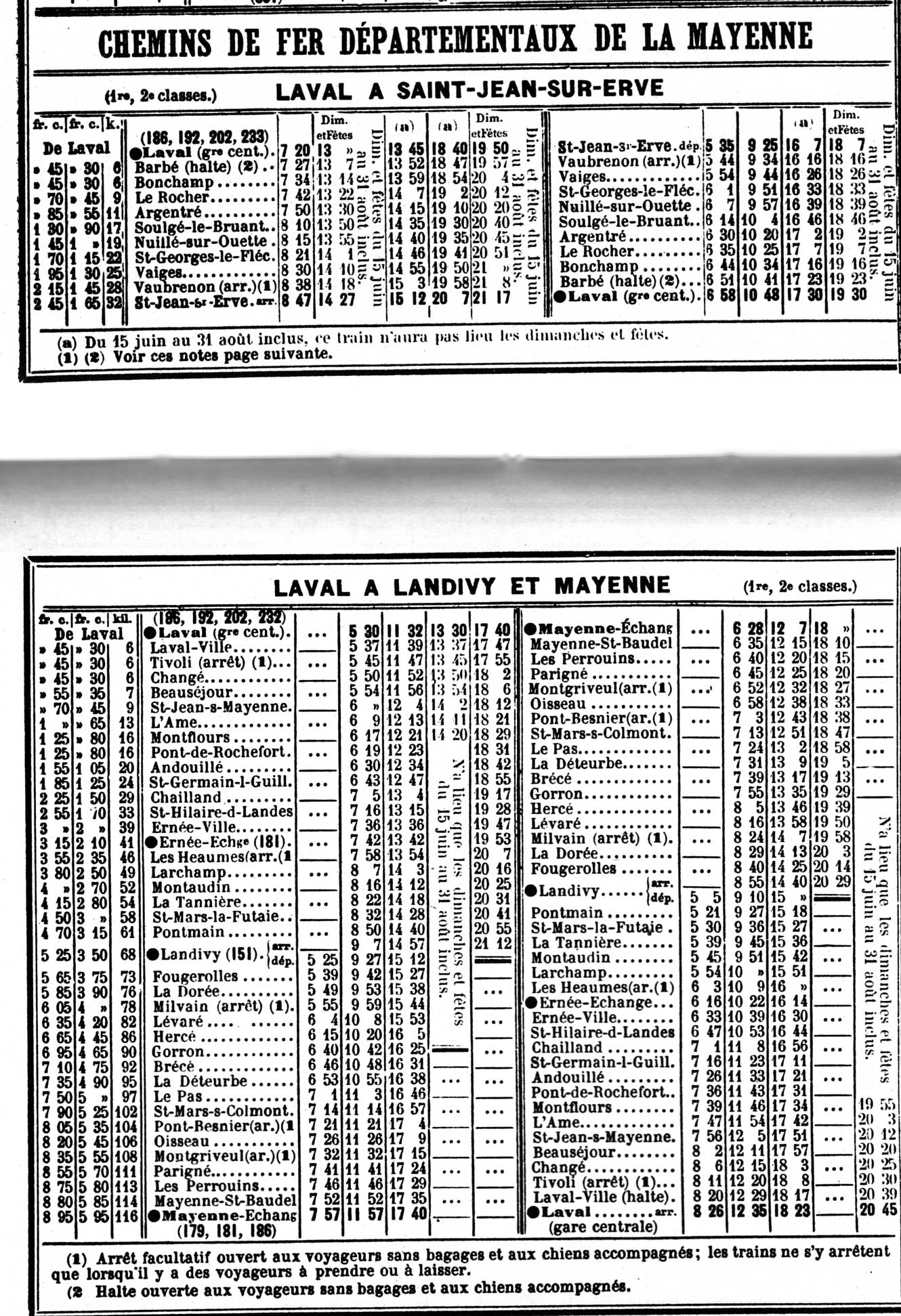 Livret Chaix - Mai 1914 : Horaire des Chemins de fer départementaux de la Mayenne